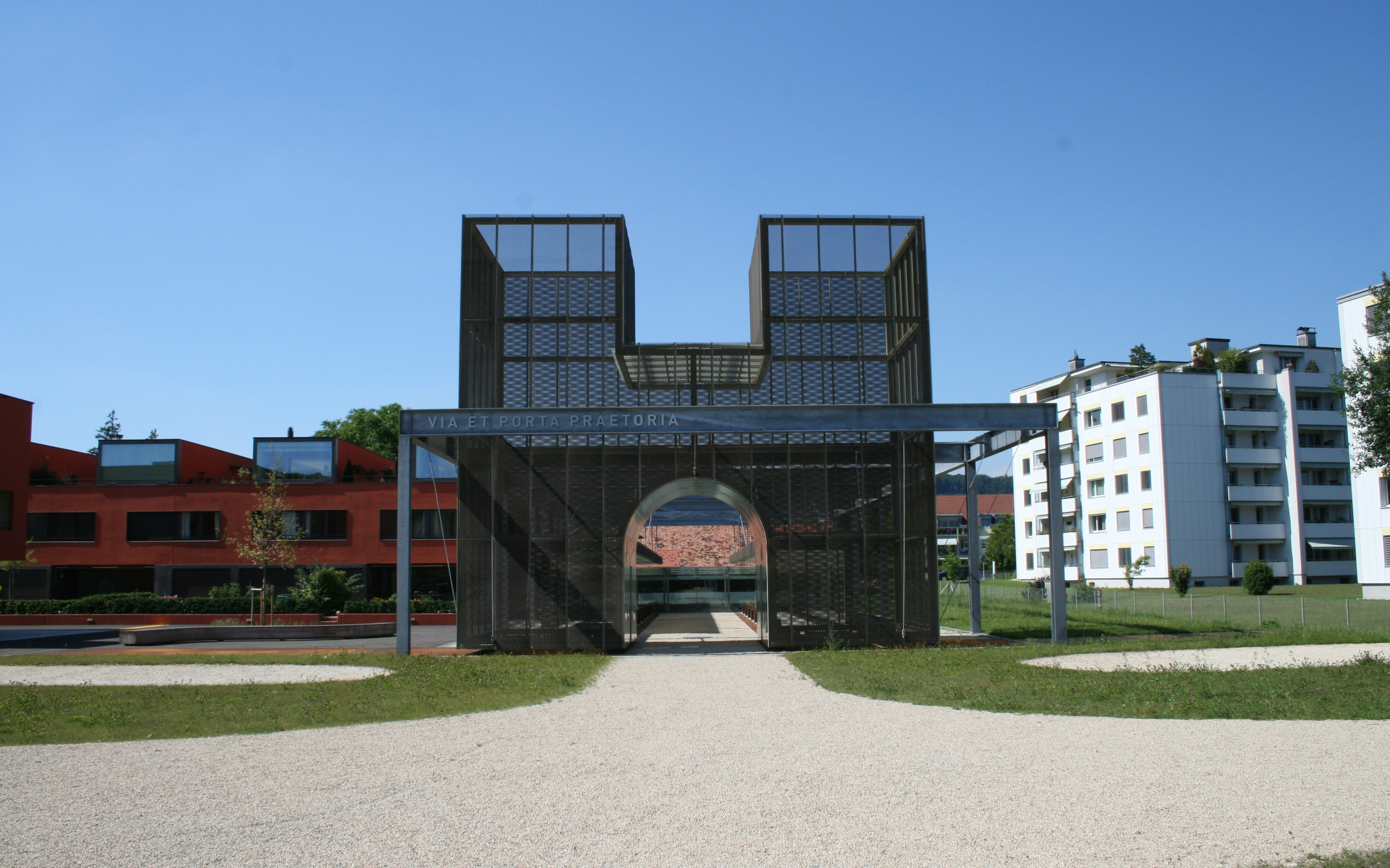 Moderne Rekonstruktion des Südtors, Vindonissa (Windisch), Schweiz